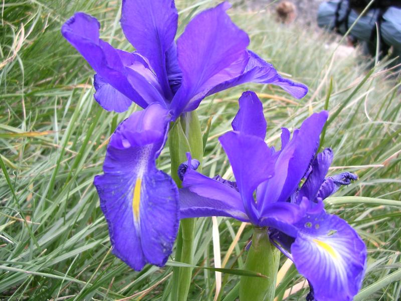 Iris des Pyrénées, photo A. Gaffard, Cirque de Gavarnie, août 2004